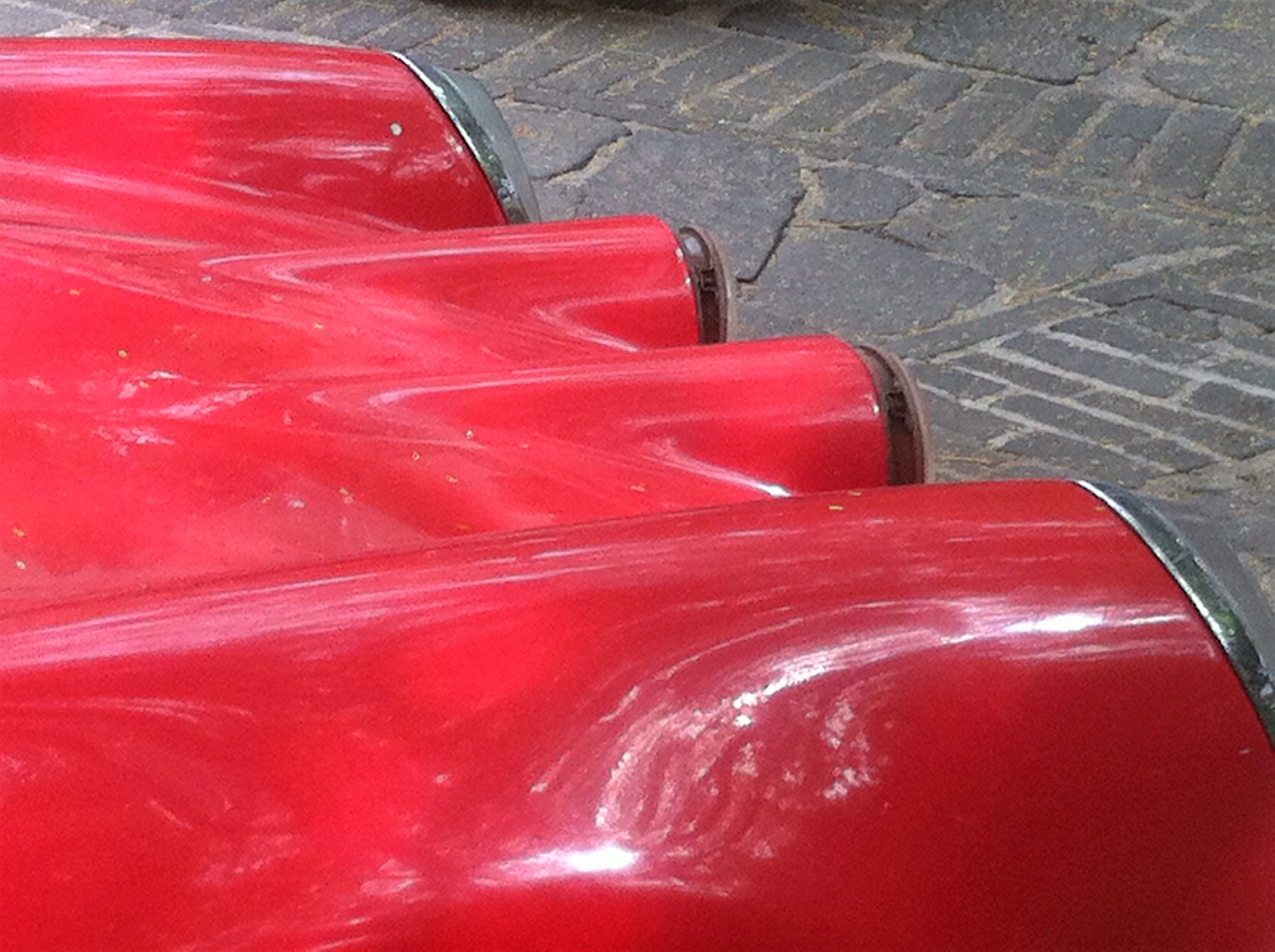 Preparacion ST año 1972